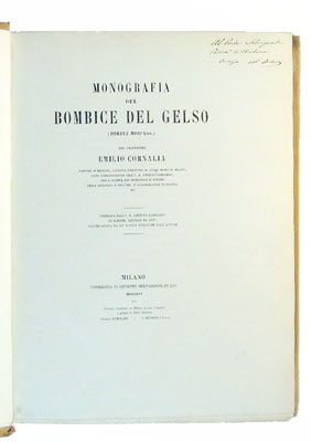 Plate from Monografia del bombice del gelso